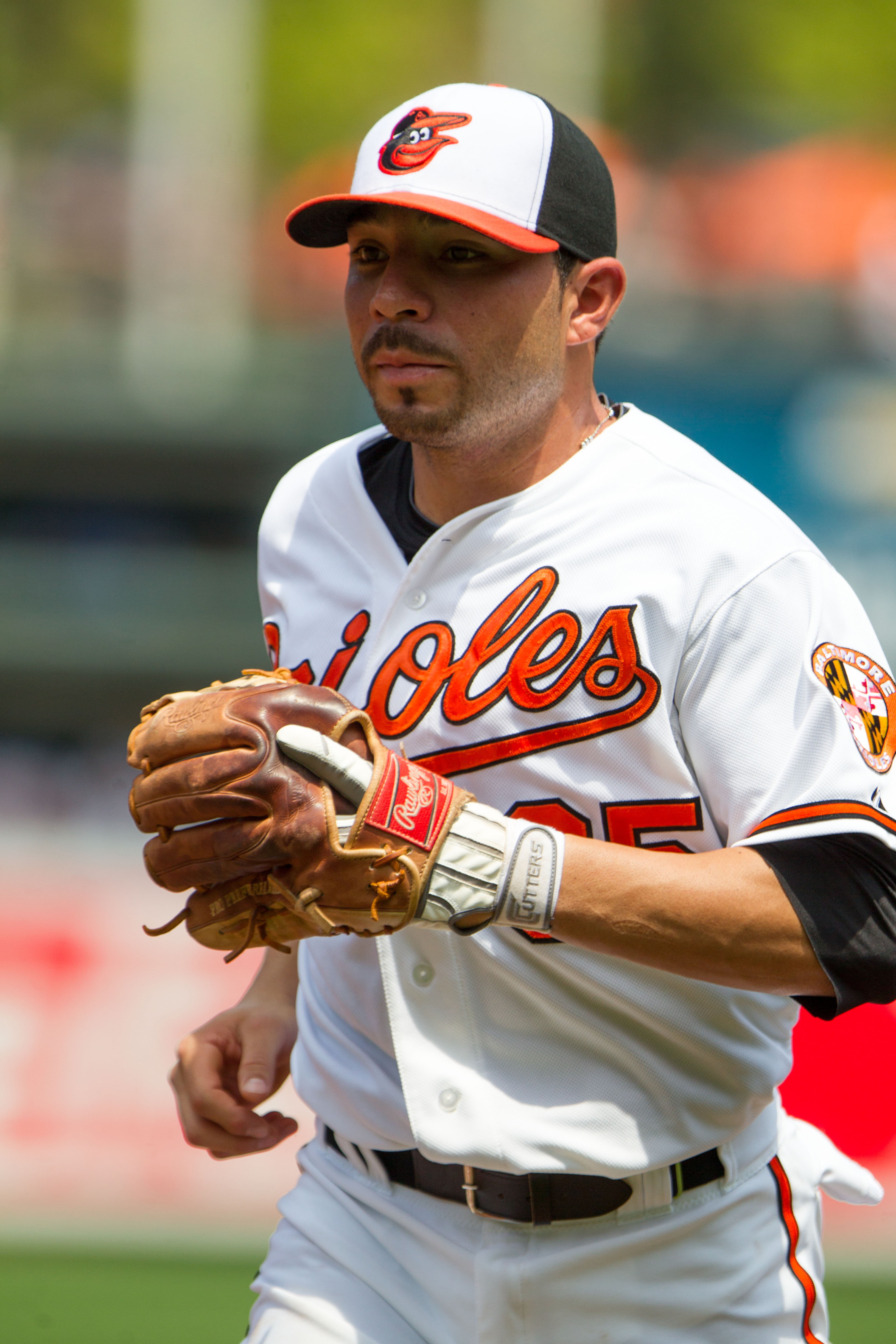 Omar Quintanilla